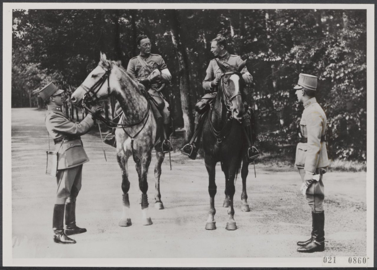 Op 3 mei 1940 wordt op het landgoed Duinrell in Wassenaar een militaire cross country verreden voor officieren van het Eerste Leger corps. Een van de deelnemers is Prins Bernhard met zijn paard Bunny.